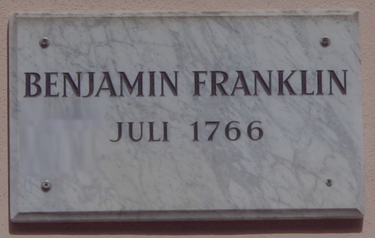 Göttinger Gedenktafel für Benjamin Franklin (1706–1790) am "Michaelishaus" in der Prinzenstraße 21.